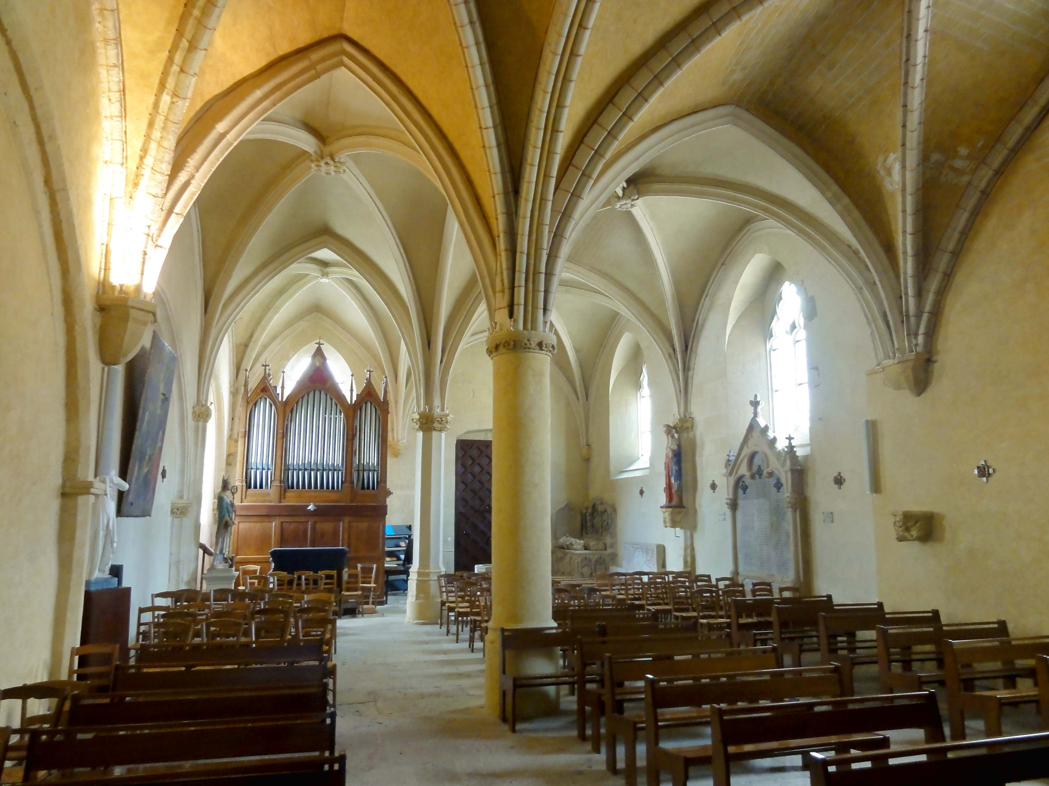 Intérieur de l'église - voir titre.